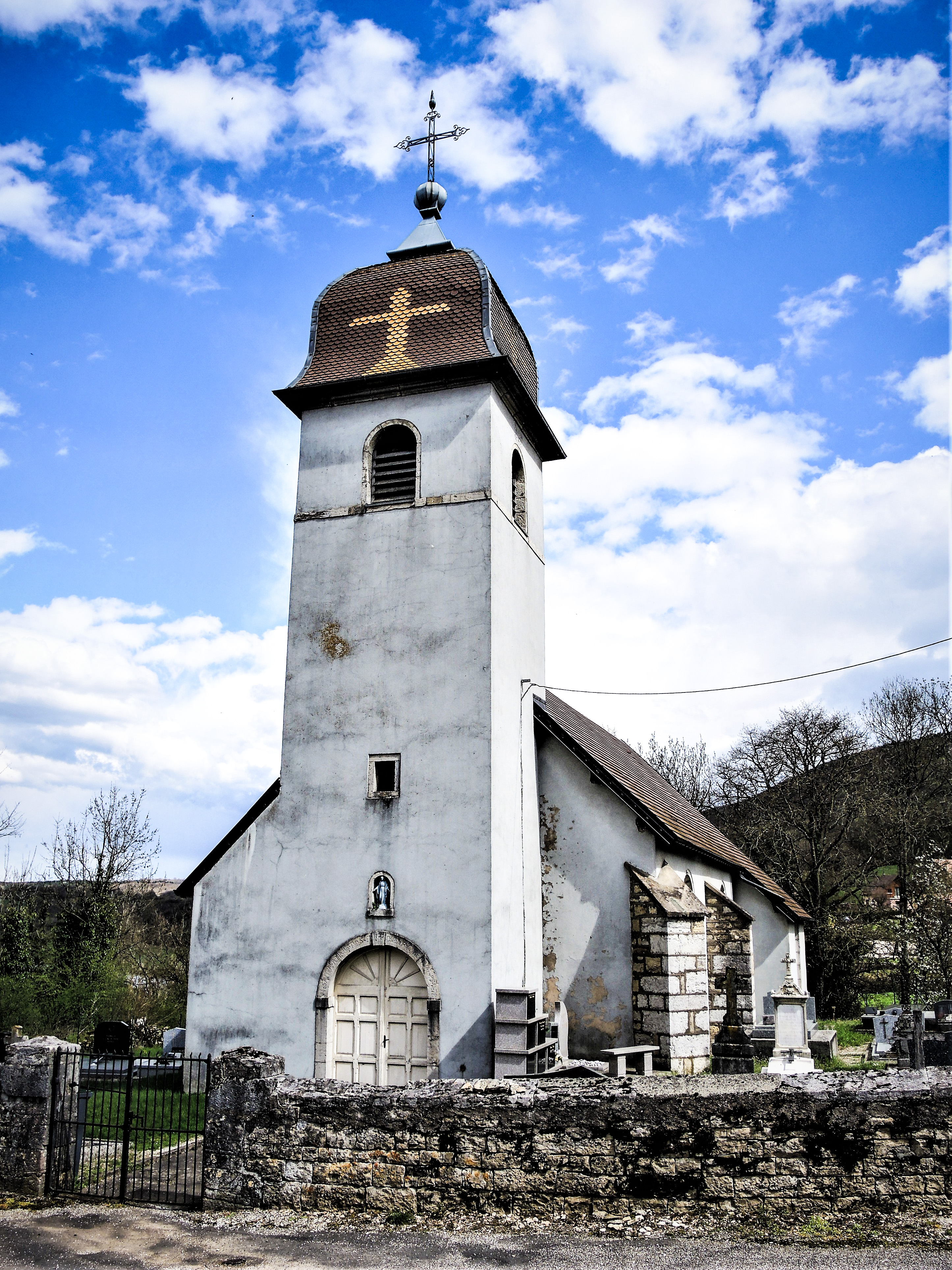 Eglise de Roche-lès-Clerval. Doubs